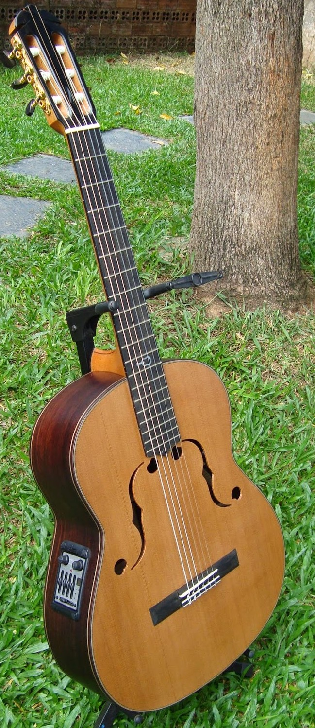 instrumento adaptado do violão clássico, este é o guitarrón gaúcho.